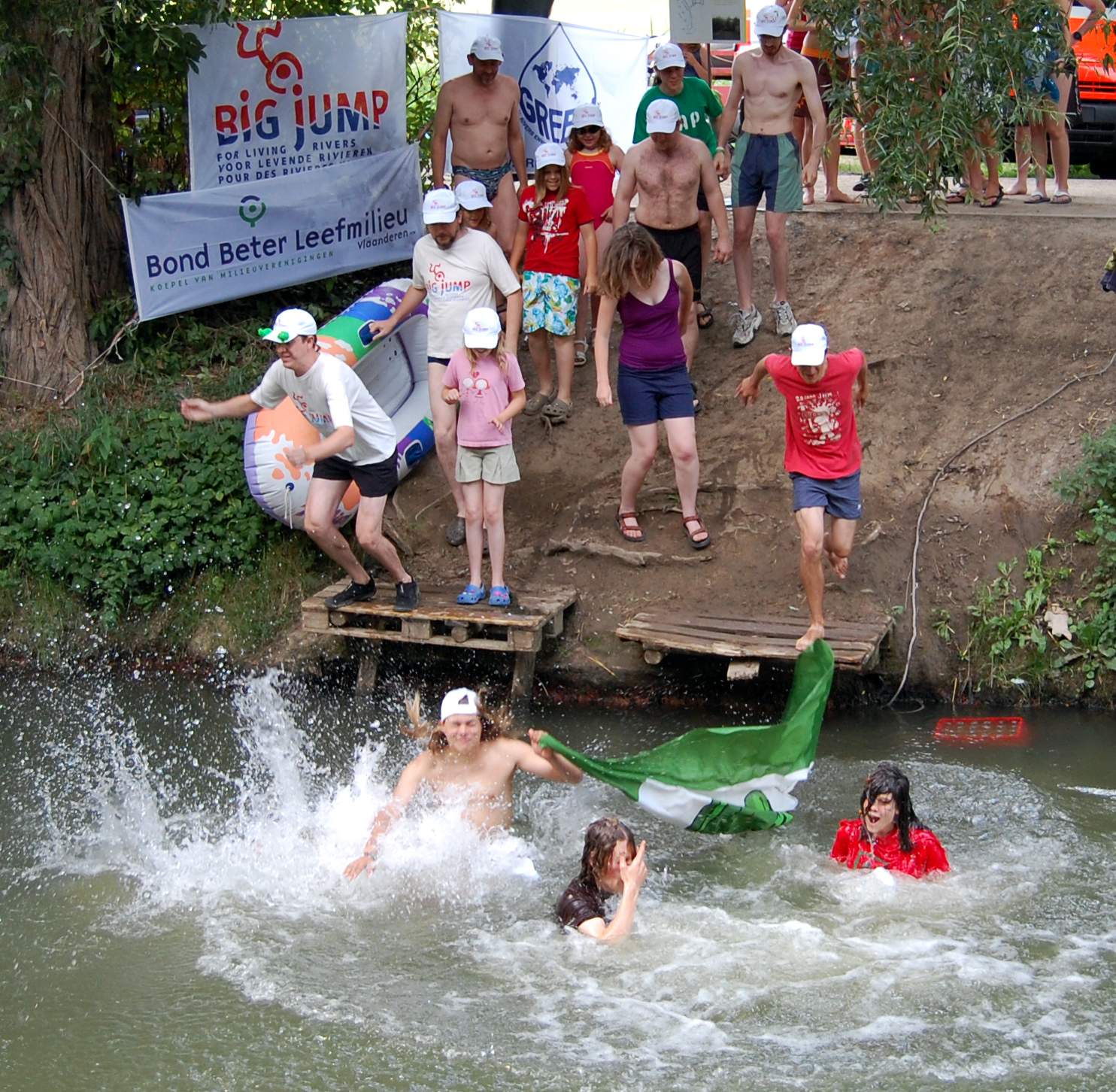 Big Jump in Leuven, Belgium